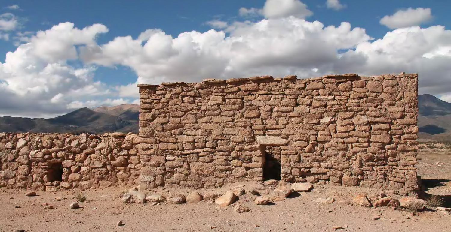 Tambo de Zapahuira This is a photo of a national monument in Chile: 707